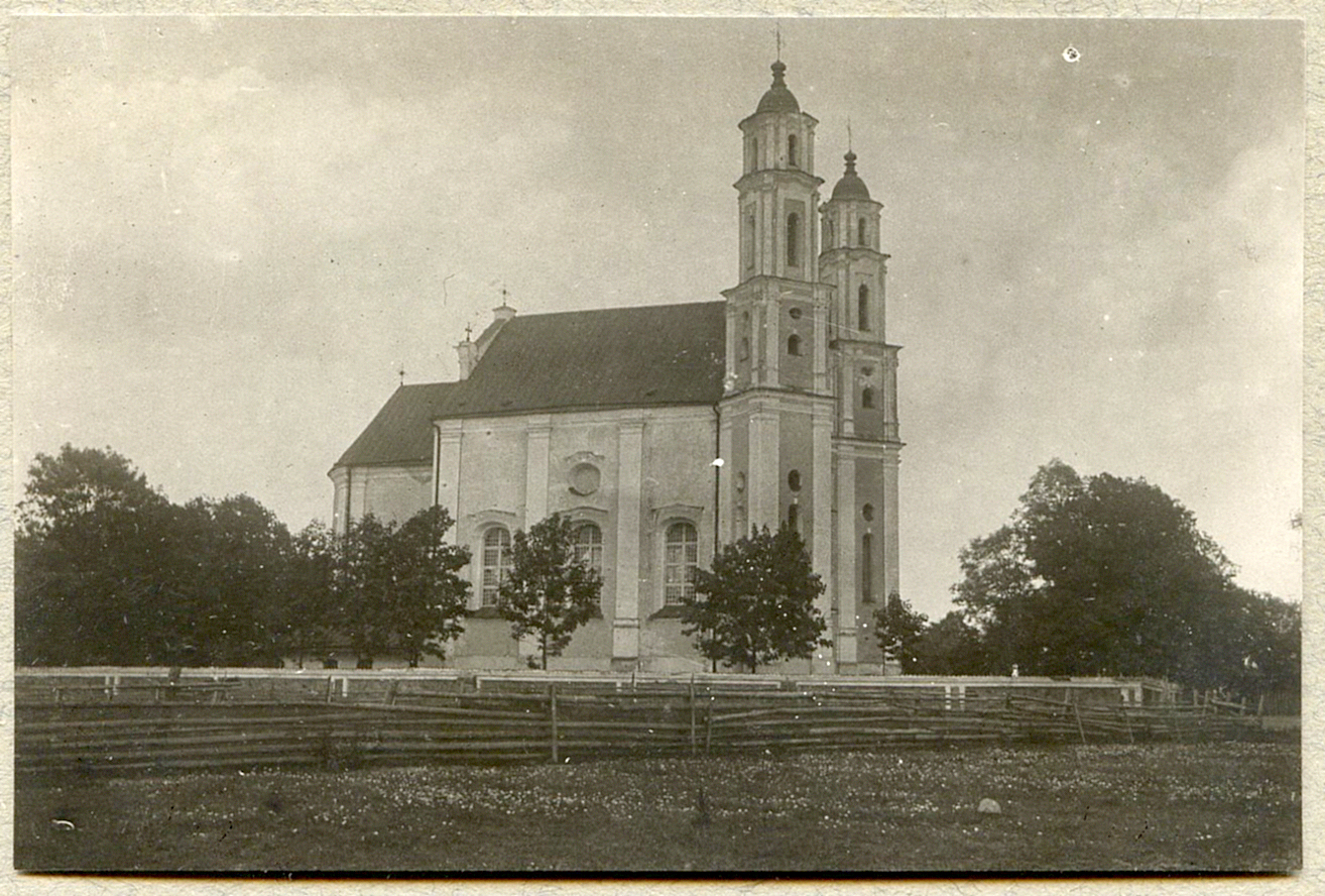 Беларуская (тарашкевіца): Лужкі (Łužki), вуліца Касьцельная (vulica Kaścielnaja). Касьцёл Сьвятога Міхала Арханёла